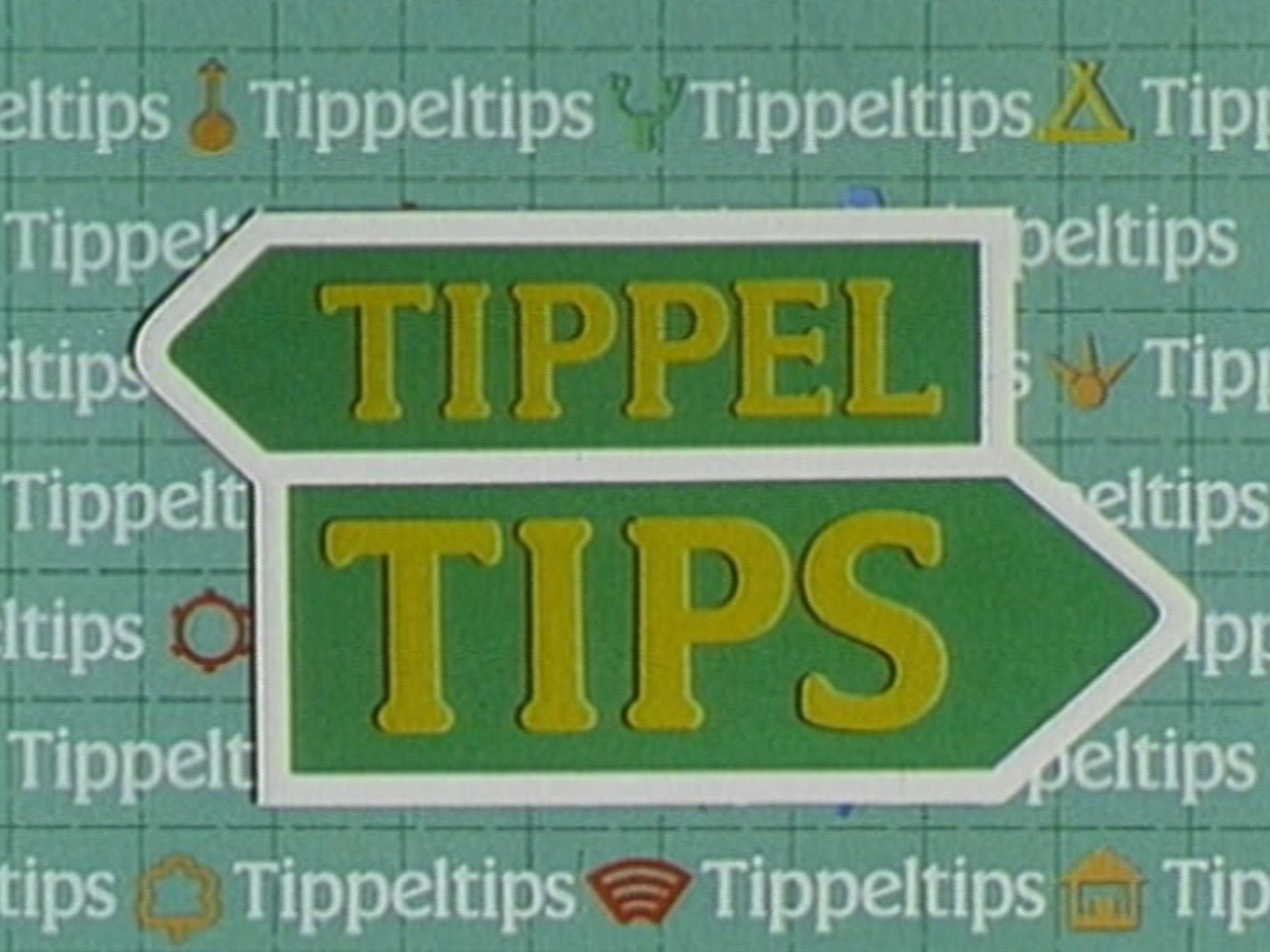 Logo von "TippelTips", a hiker's programme in GDR television